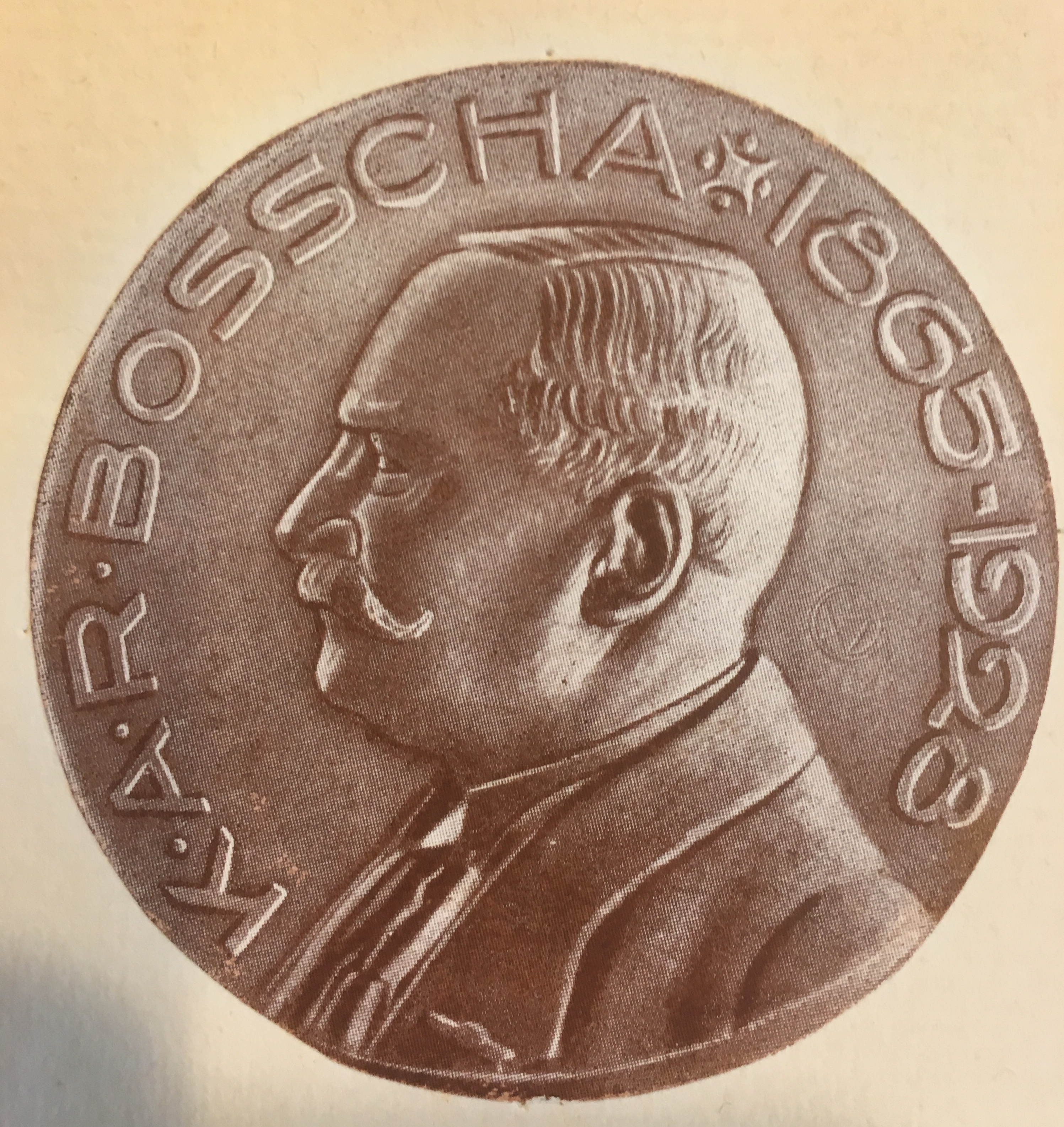 Afbeelding van de Bosscha Medaille